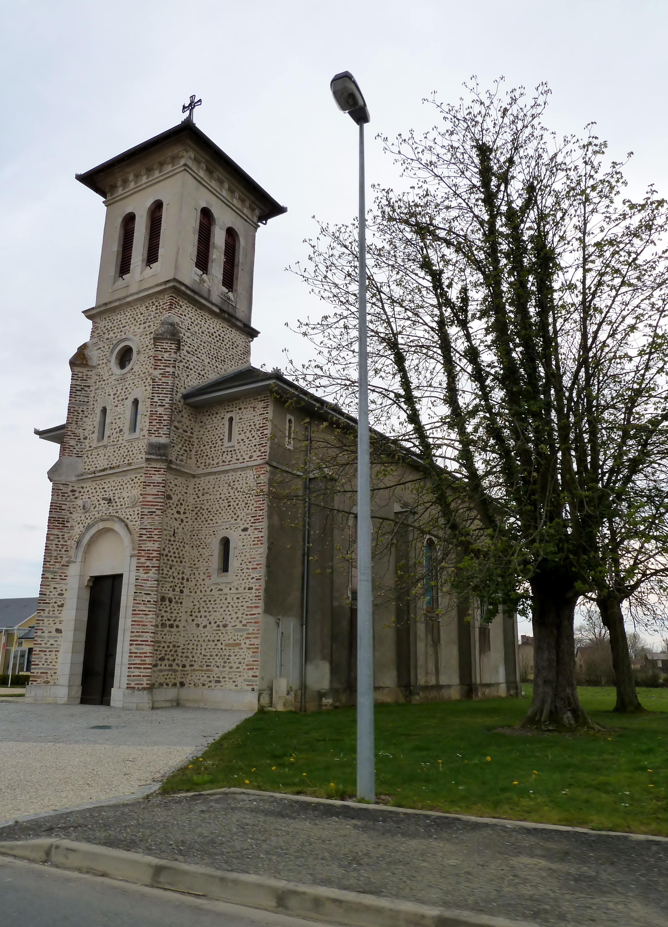 Église d'Auriac (Pyrénées-Atlantiques)